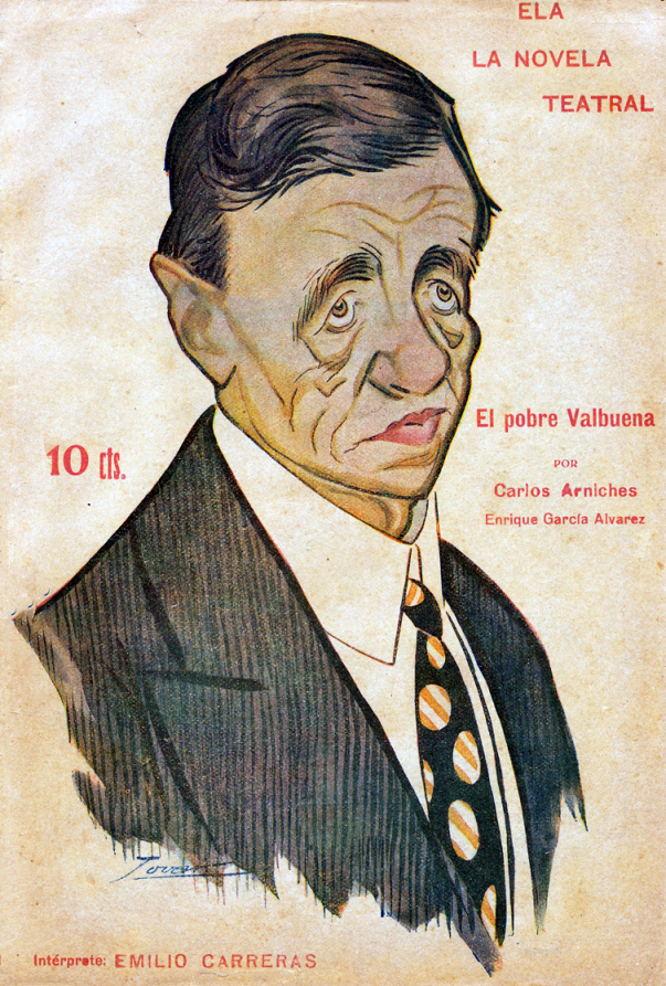 Caricatura de Emilio Carreras.